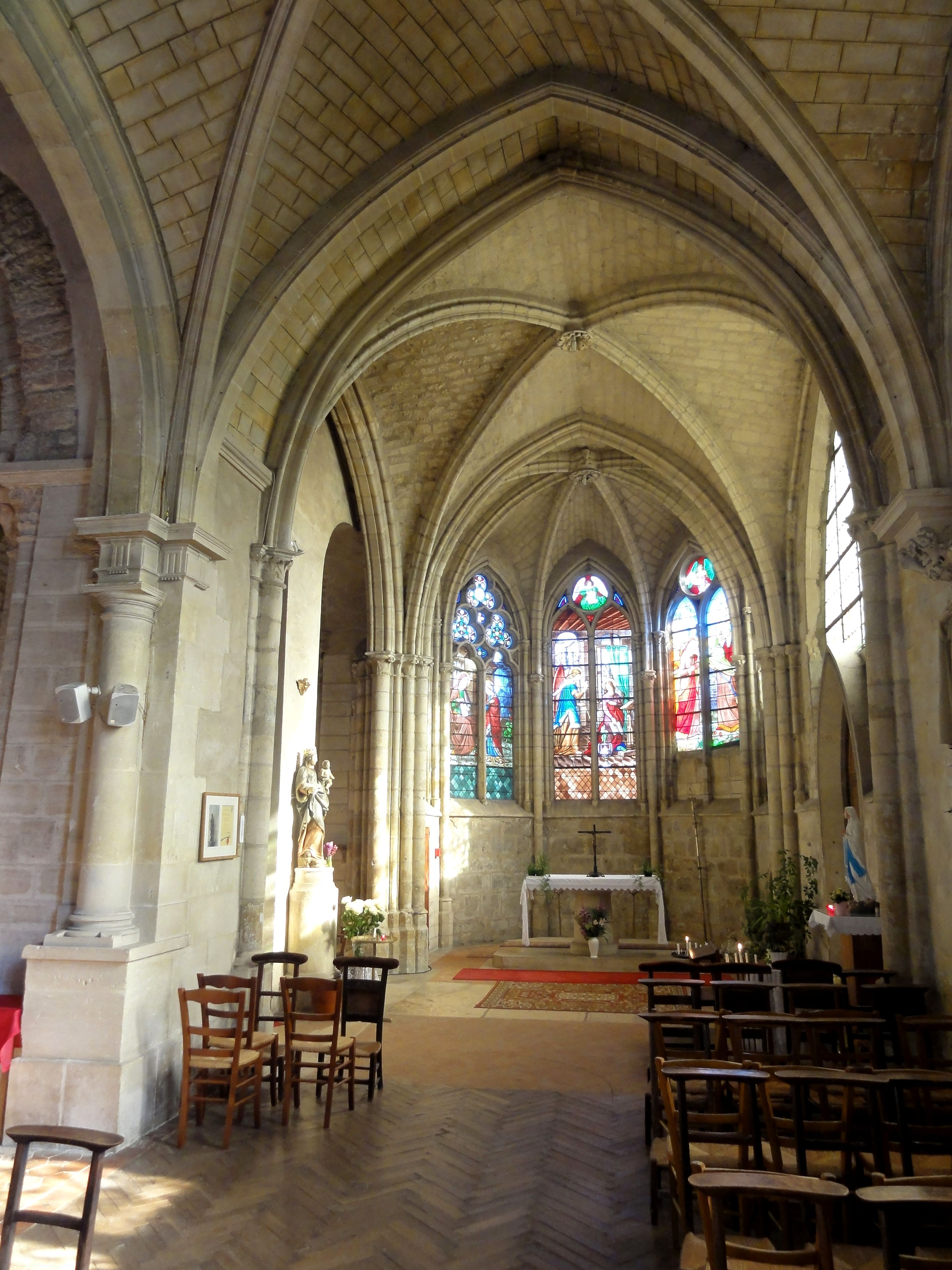 Vue dans la chapelle de la Vierge.